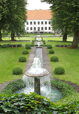 Clausholm Slot near Randers, Denmark